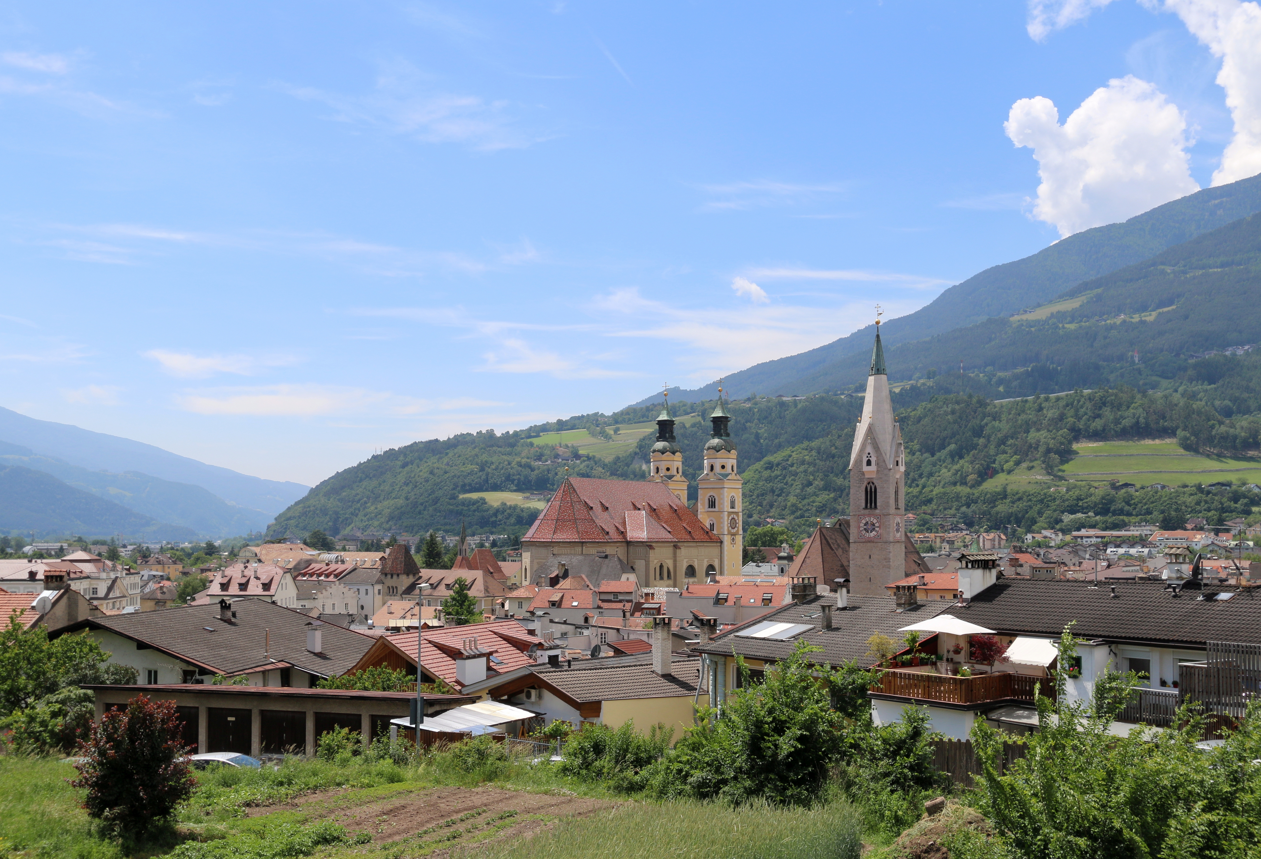 Brixen, Südtirol: Brixener Dom Mariä Himmelfahrt